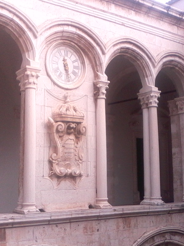 dubrovački grb u Kneževu dvoru